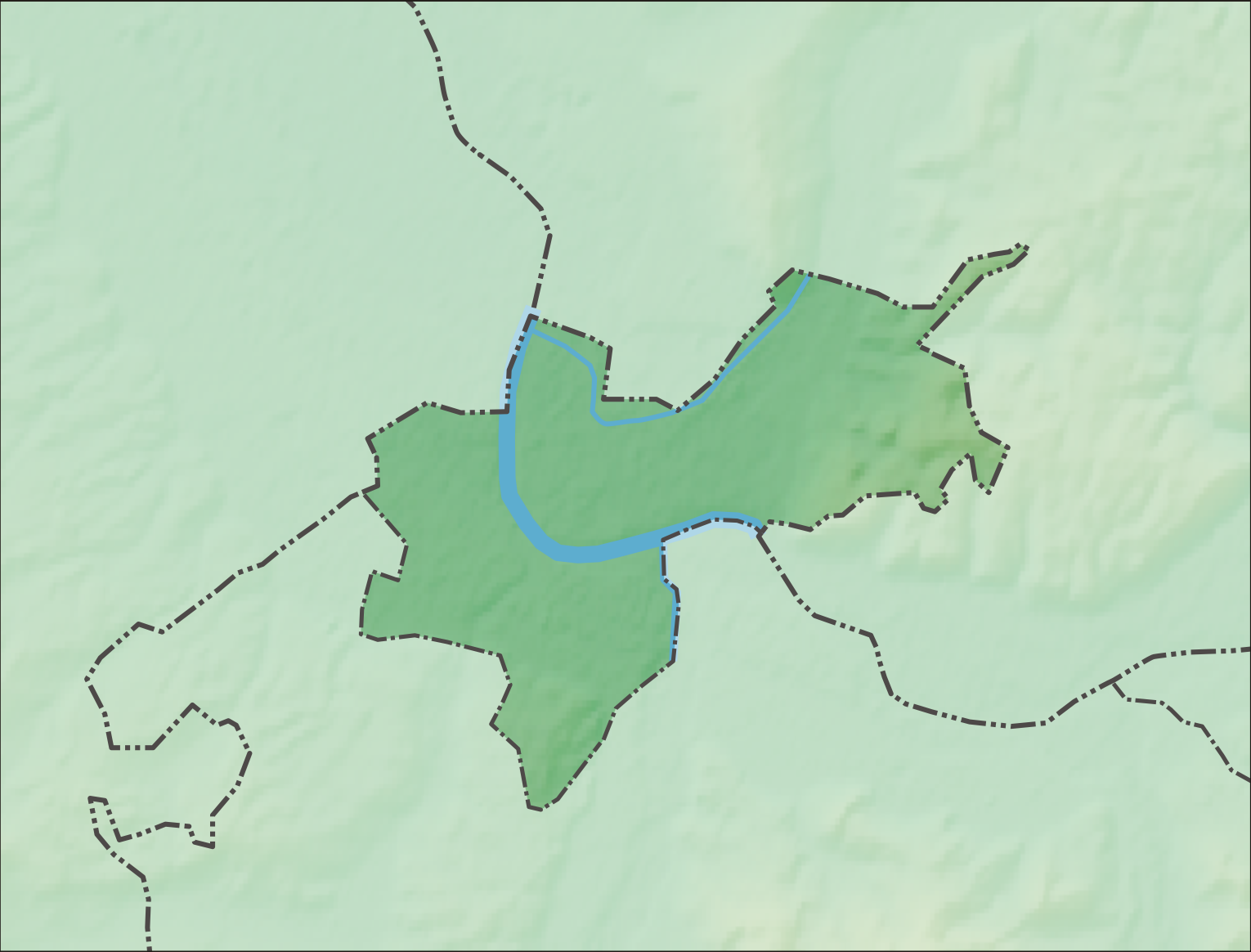 Reliefkarte des Kantons Basel-Stadt Topographischer Hintergrund: NASA Shuttle Radar Topography Mission (public domain). SRTM3 v.2.